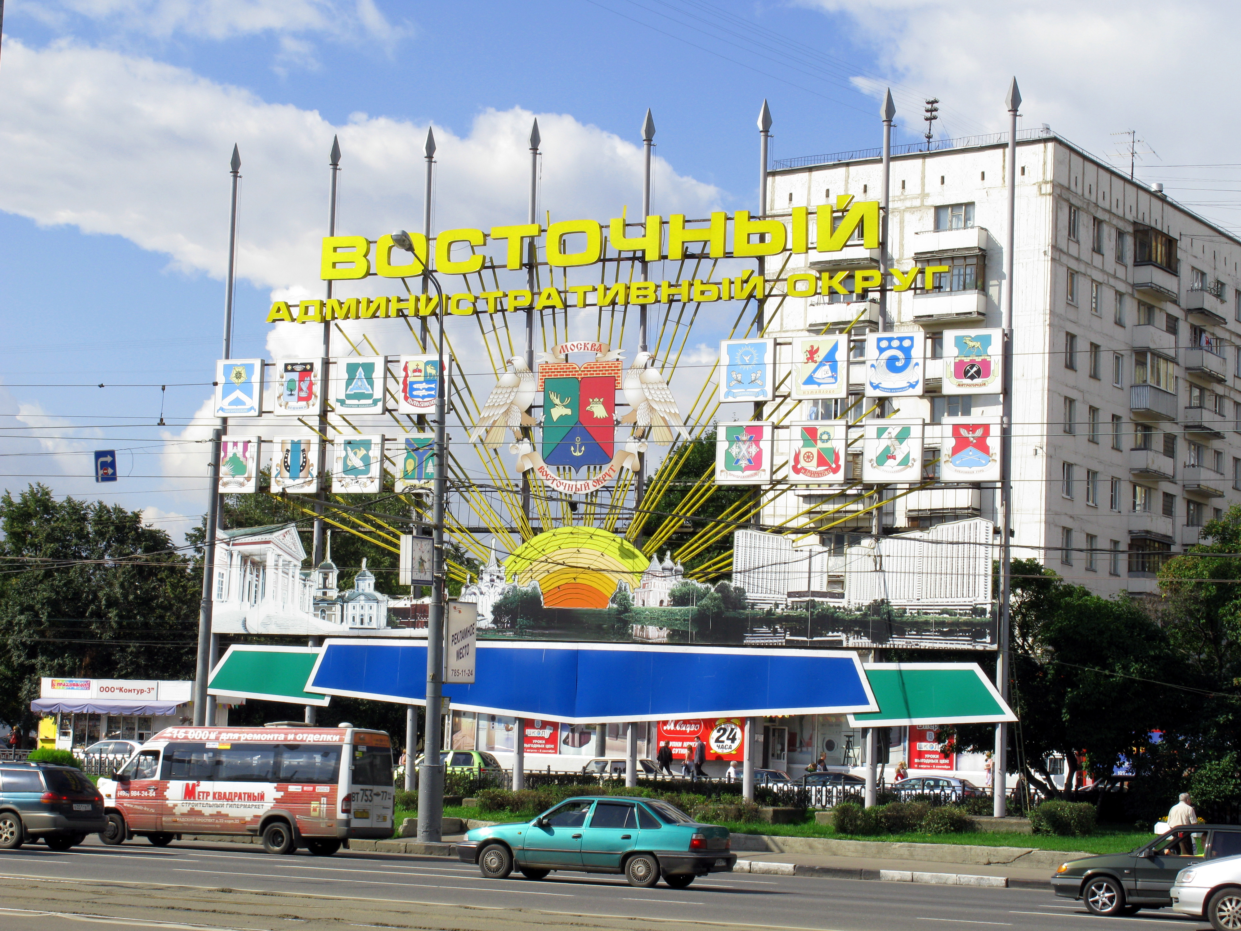 Преображенская площадь